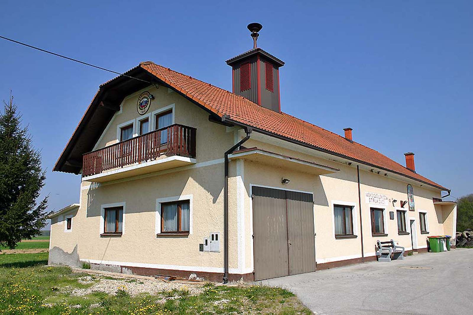 Prostovoljno gasilsko društvo Strukovci. Volunteer fire Strukovci. Freiwillige Feuerwehr Strukovci.